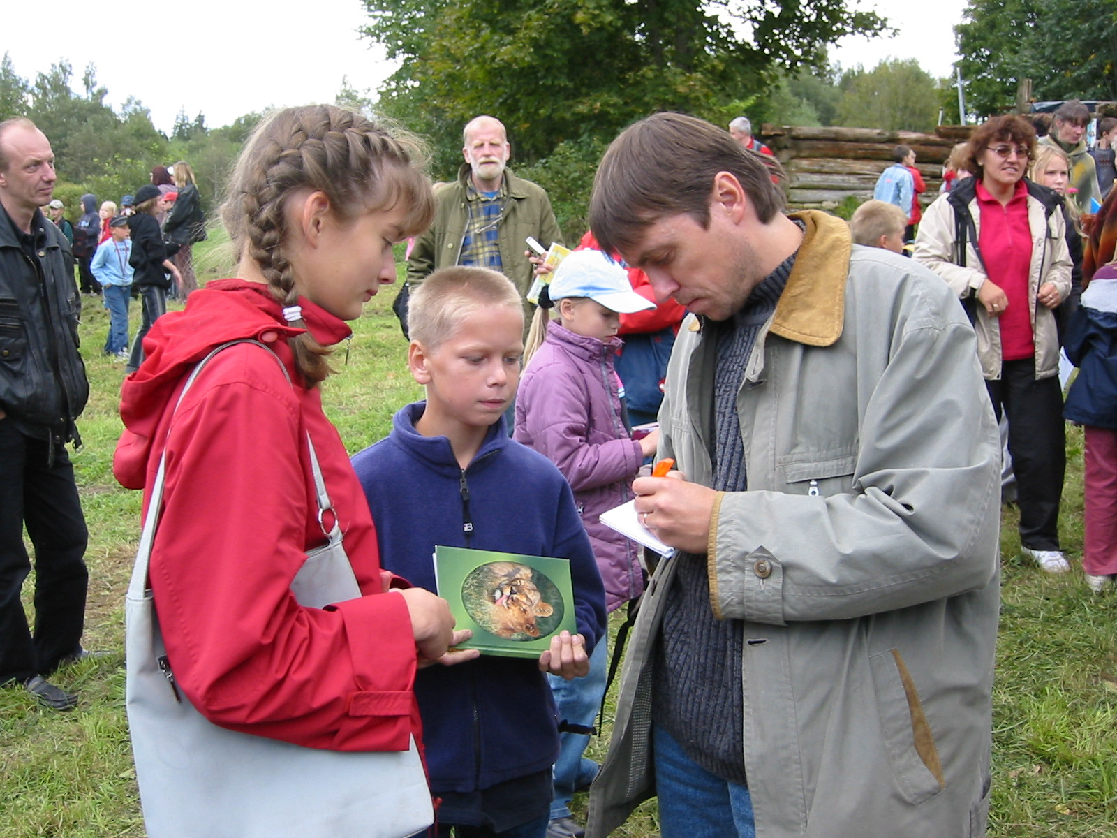 Jaanus Vaiksoo Pokumaal 9. septembril 2004